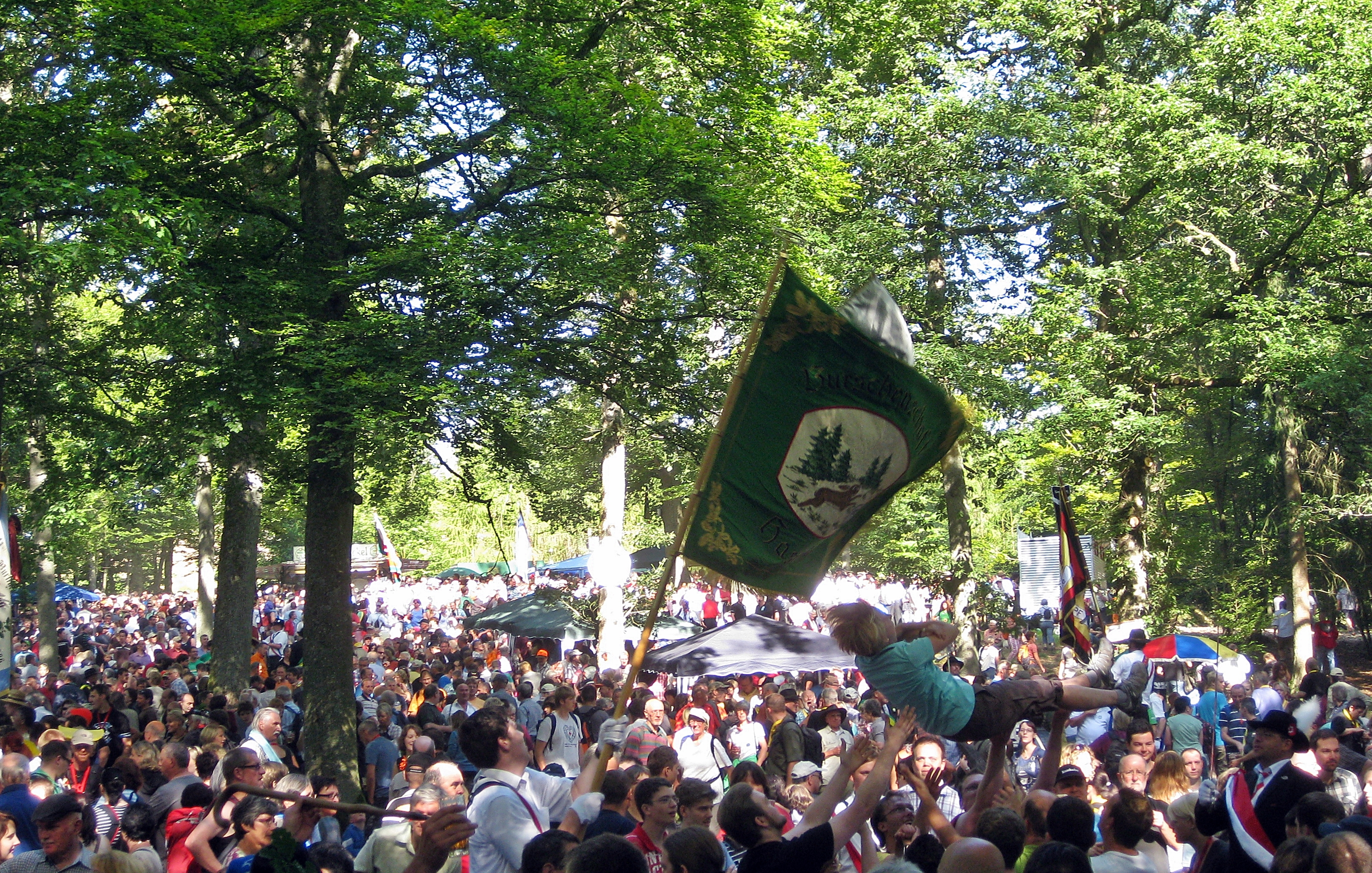 Deutschland, Biedenkopf: Grenzgang; historisches Heimatfest. Munteres Treiben auf dem Frühstücksplatz des 3.Tages mit vielen Grenzgängern, deren Gesellschaftsfahnen sowie weiteren Gästen und Besuchern. Im Vordergrund wird eine junge Frau bei der Burschenschaft Hasenlauf begrüßt und vom ersten Führer Björn Gillat "unter die Fahne genommen".